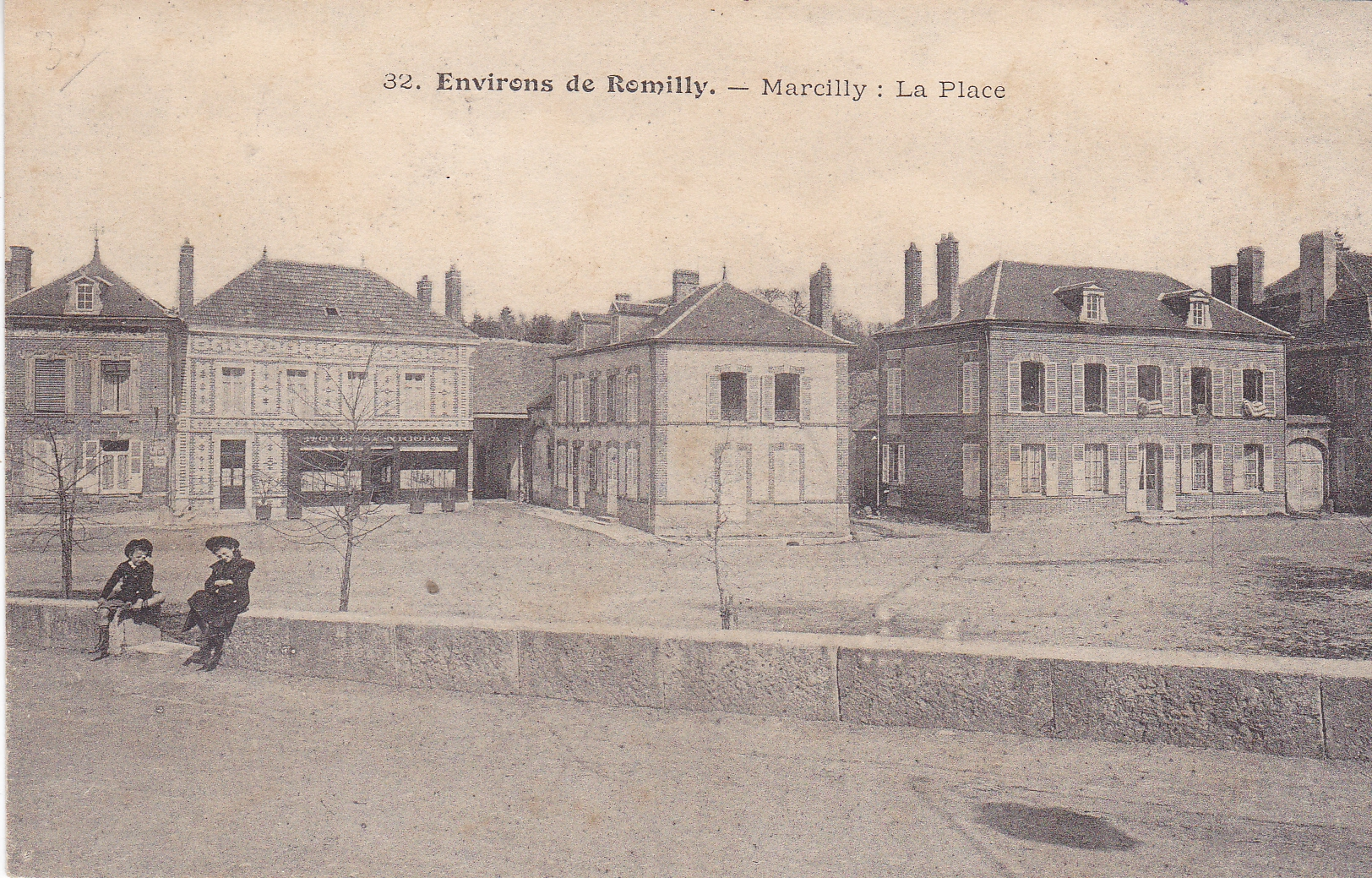 Marcilly-sur-seine maison de l'artiste peintre Léon Broquet 1901 (centre de la photographie)